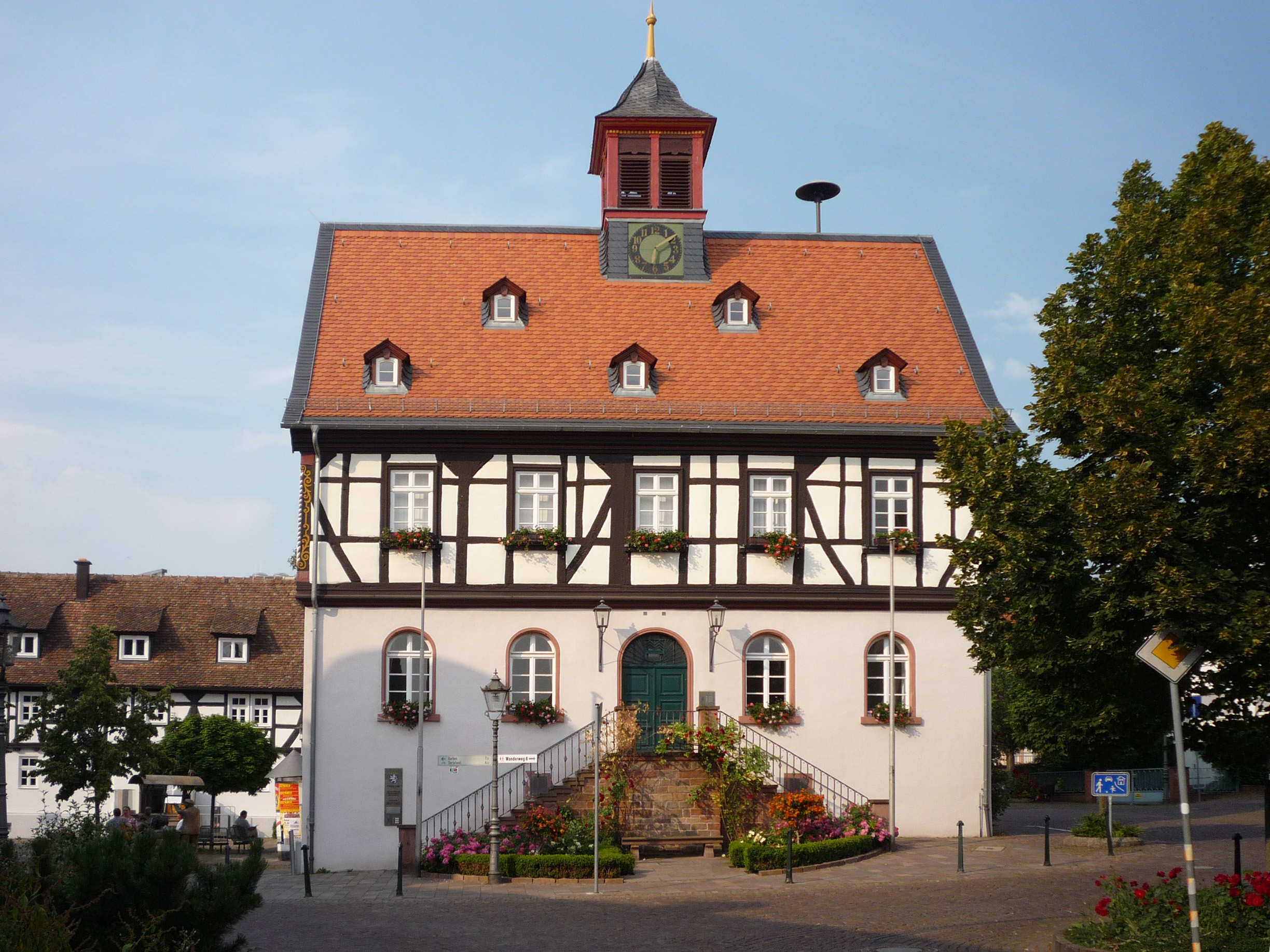 Altes Rathaus - Für das Fachwerkobergeschoss sind die 1570er Jahre überliefert. Das massive Erdgeschoss erhielt seine gegenwärtige Gestalt in der 1. Hälfte des 19. Jahrhunderts. Bad Vilbel, Marktplatz 5, südlich vor der Nidda-Brücke